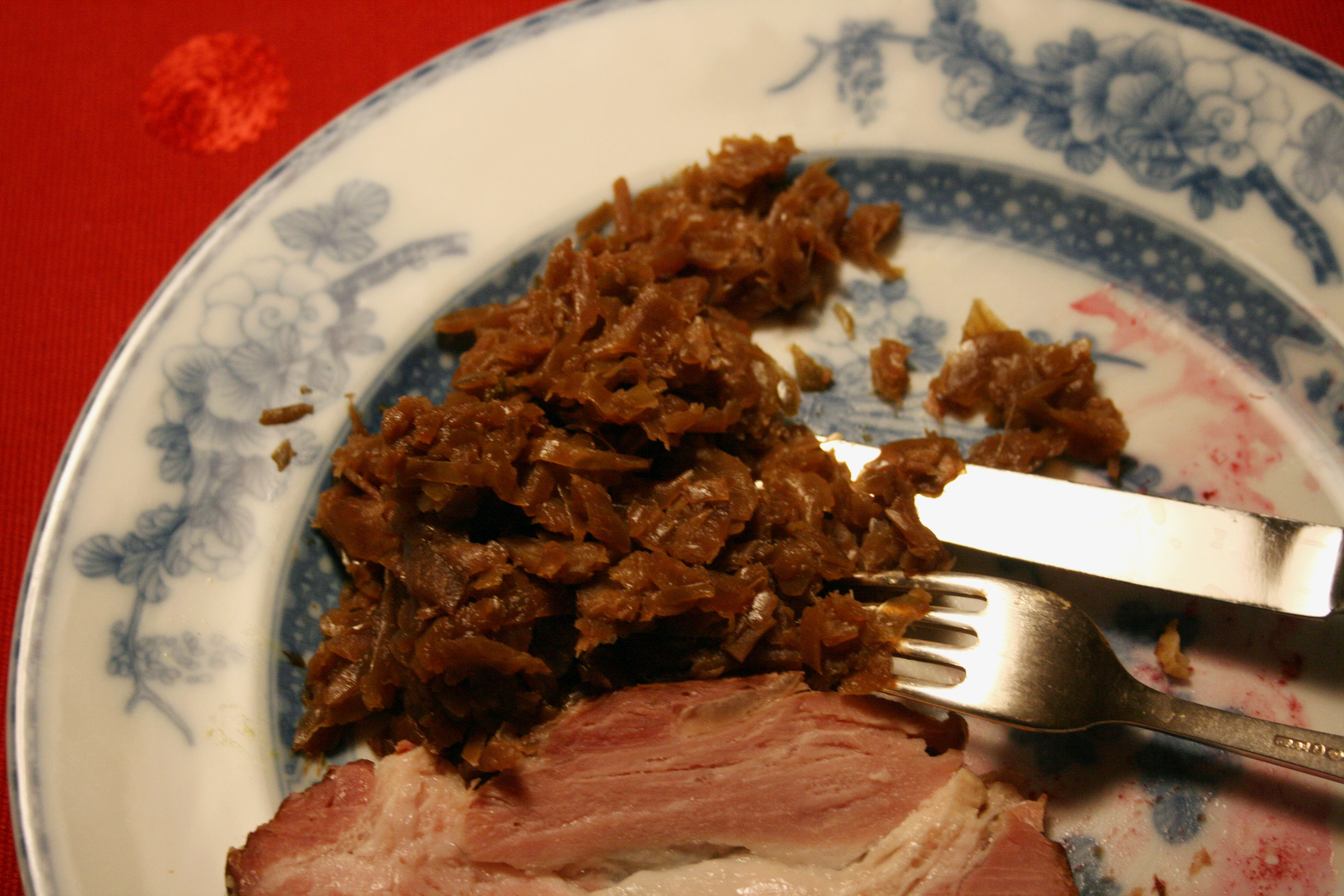 Brunkål och skinka som julmat (jag tog bara bilden och slapp äta det)